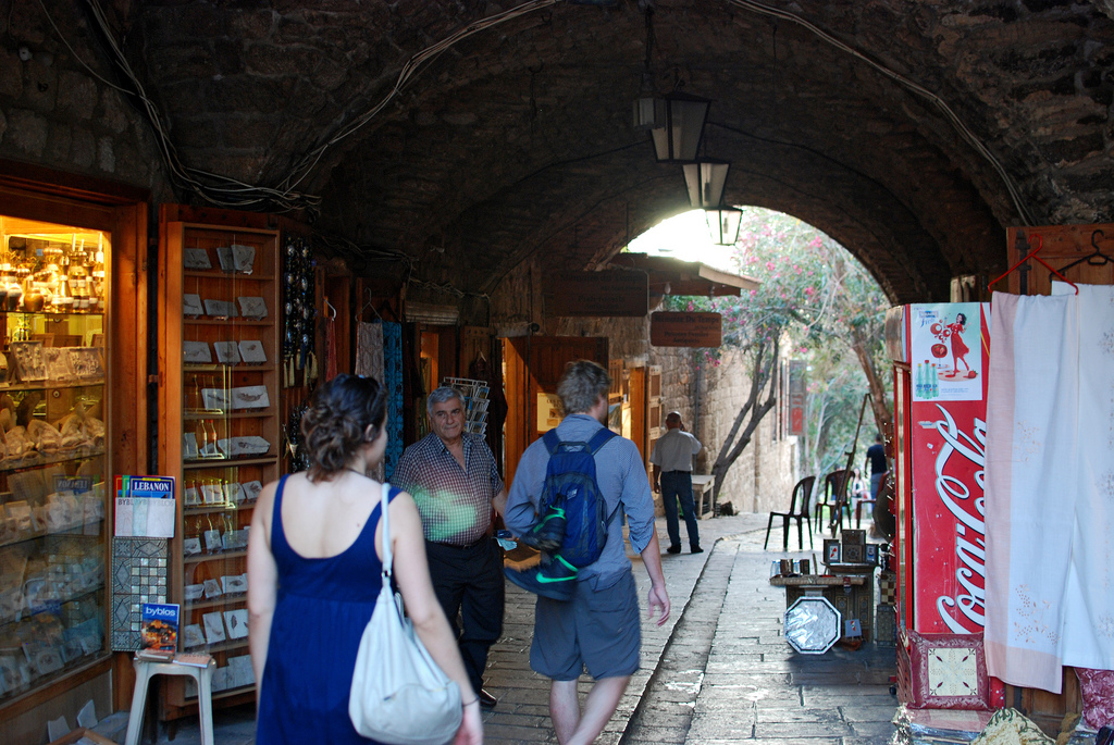 byblos, lebanon.